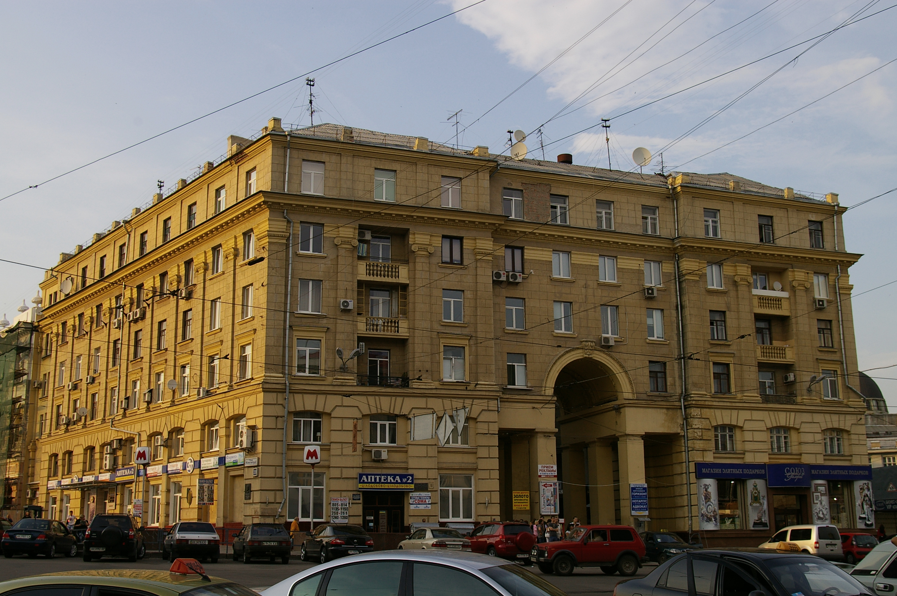 Харьков